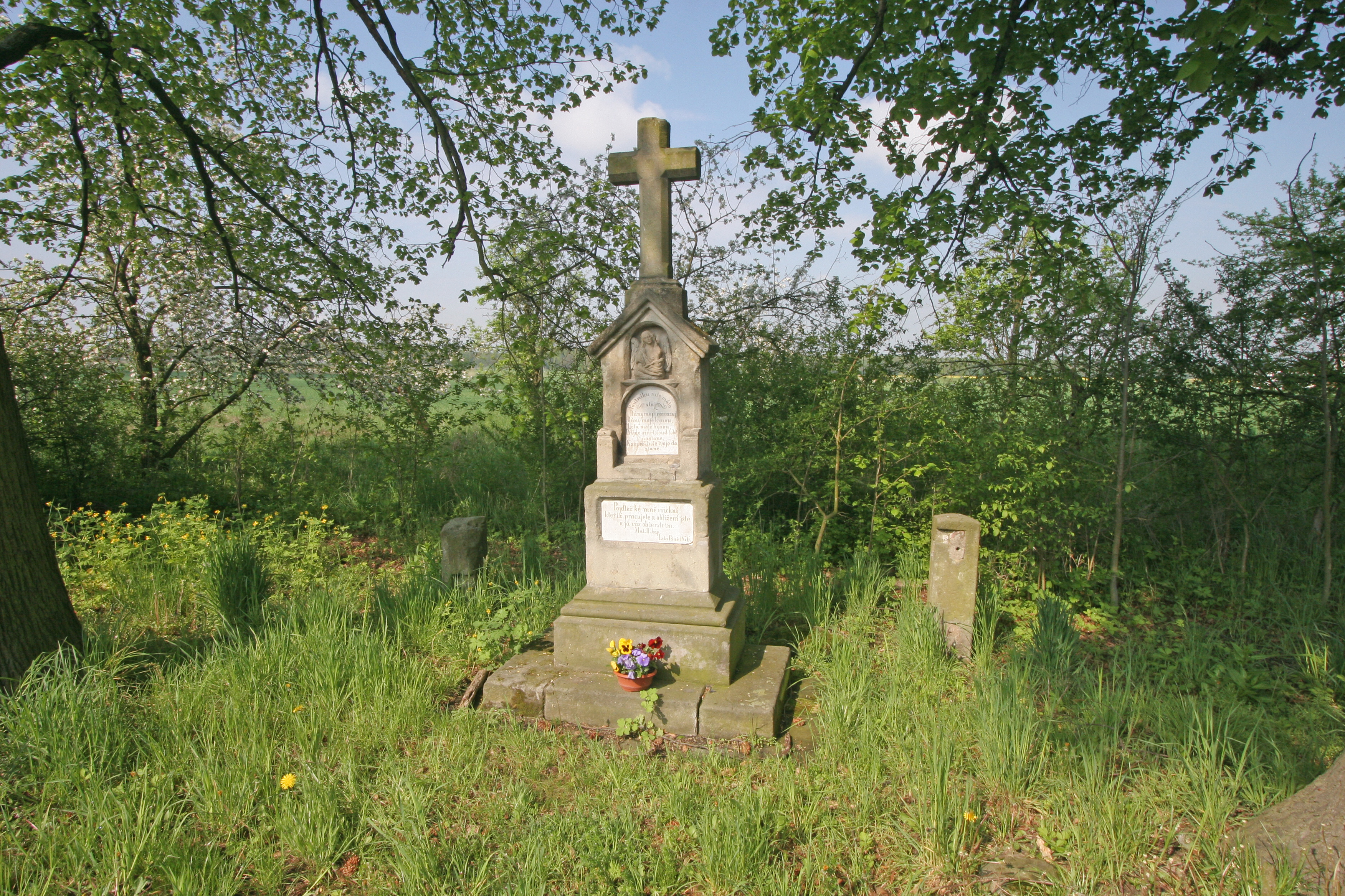 Staročernsko křížek